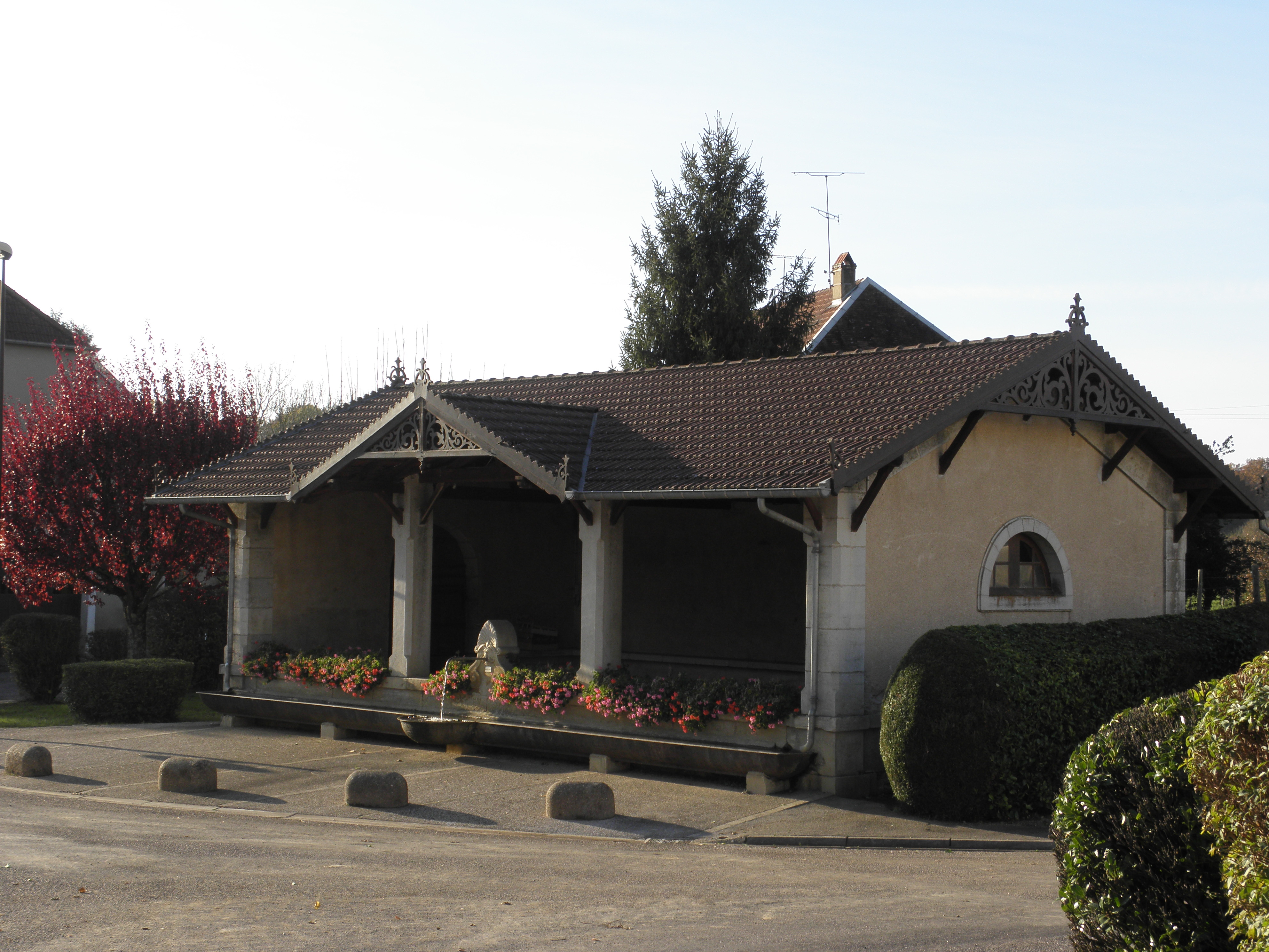 CHAMPTONNAY le lavoir